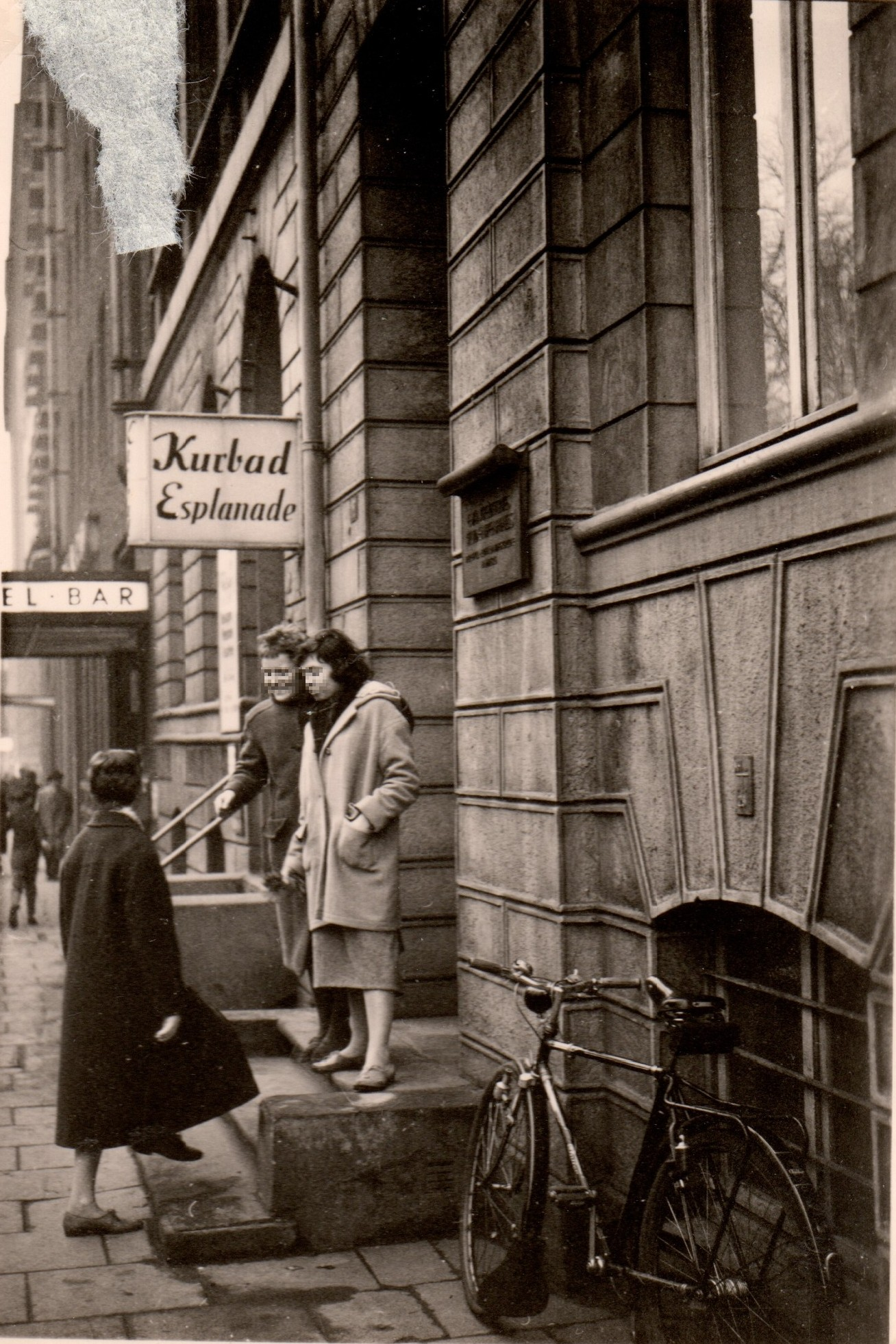 Eingang Esplanade 15 in Hamburg, damals Sitz der Evangelischen Studentengemeinde